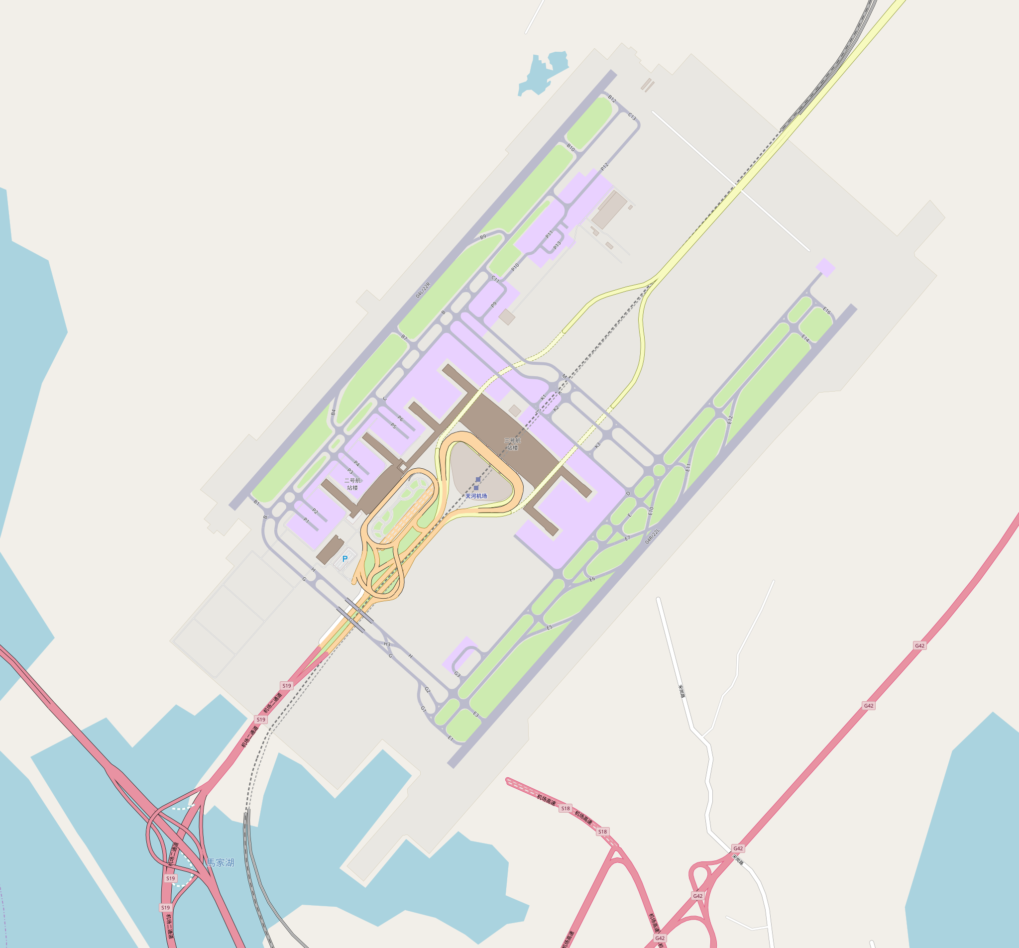 武汉天河国际机场布局图